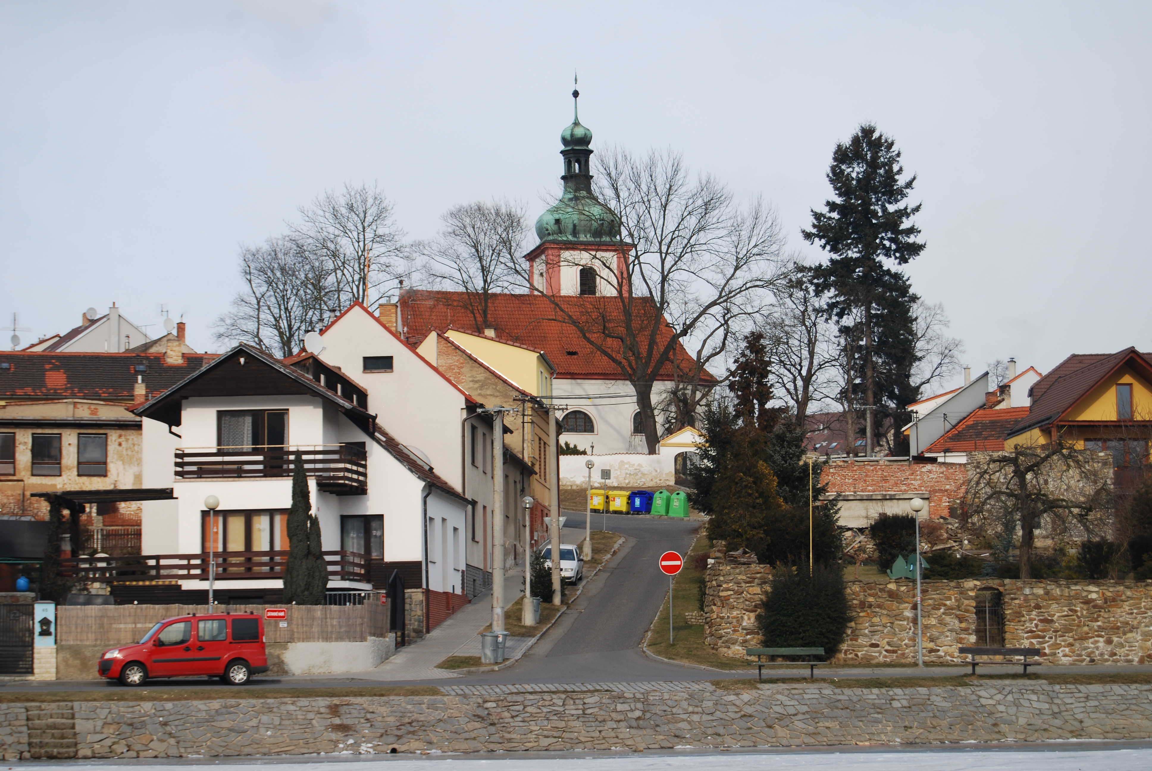 Pohled na Václavské předměstí přes zamrzlou řeku Otavu. Písek. Česká republika.